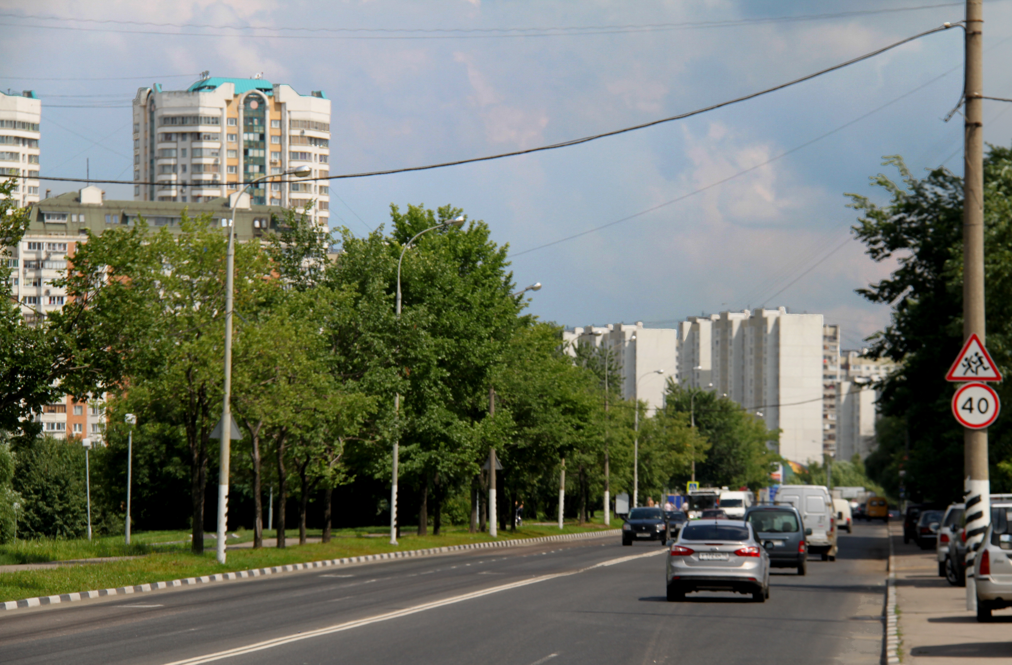 Проектируемый проезд № 5302 в Зябликово